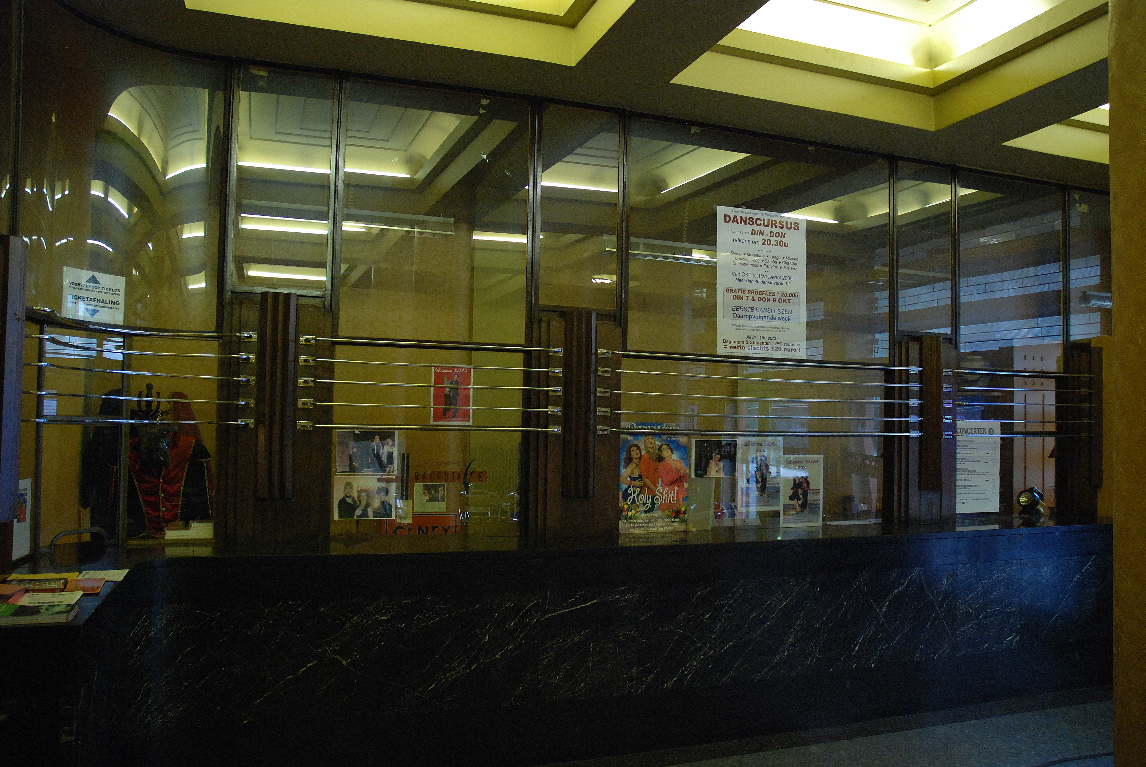 Backstage, de inkomhal van het cultuurhuis, voormalig hoofdkwartier van de socialistische krant "Vooruit", in art deco in de Belgische stad Gent